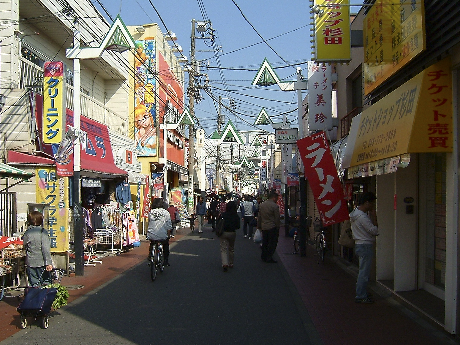 杉田商店街。横浜市磯子区。